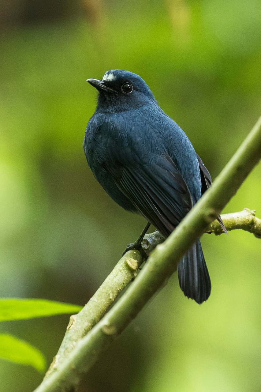 Sunda Robin - Gunung Gede_MG_4121